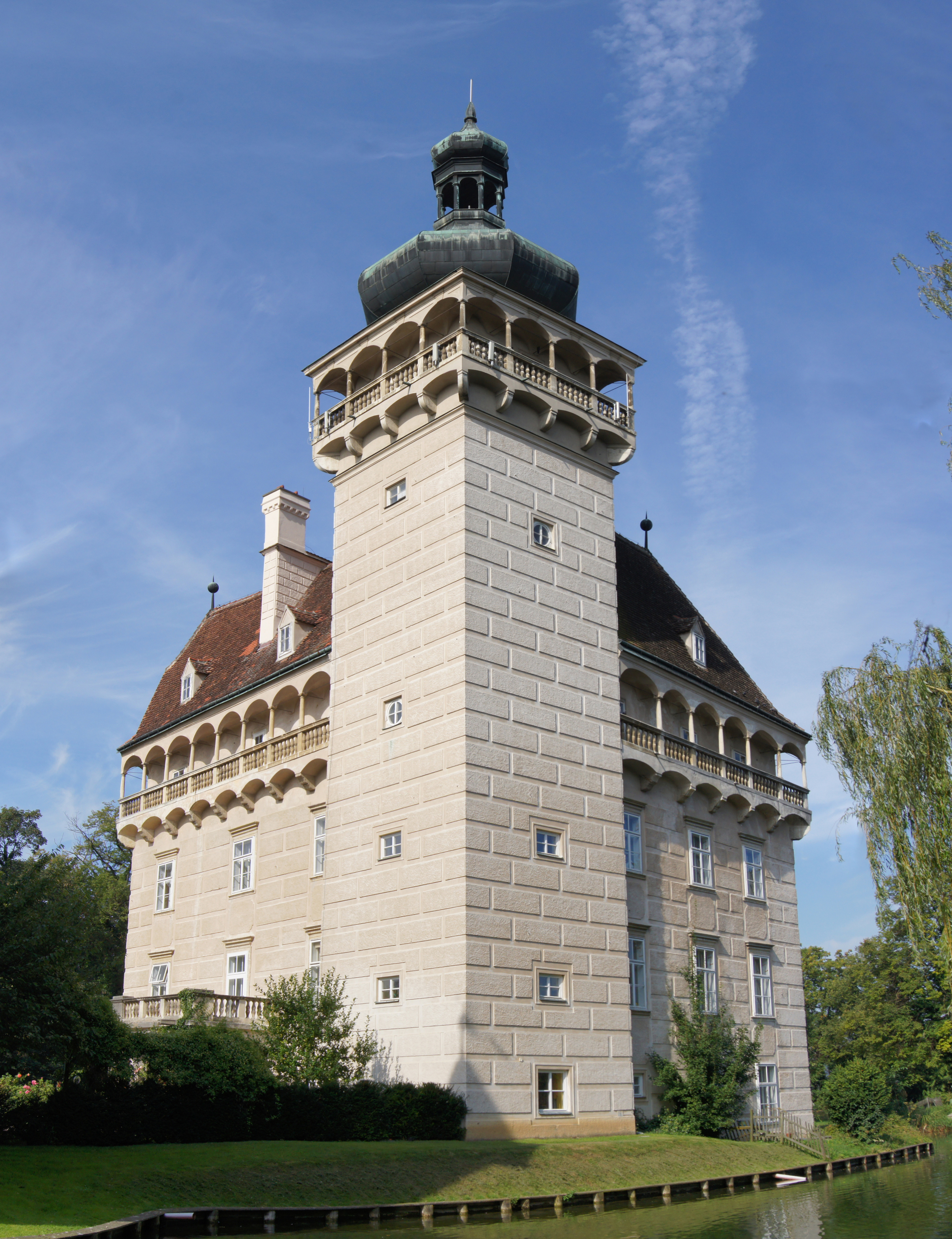 Das sogenannte "Altschloss" des Schlosses Pottenbrunn